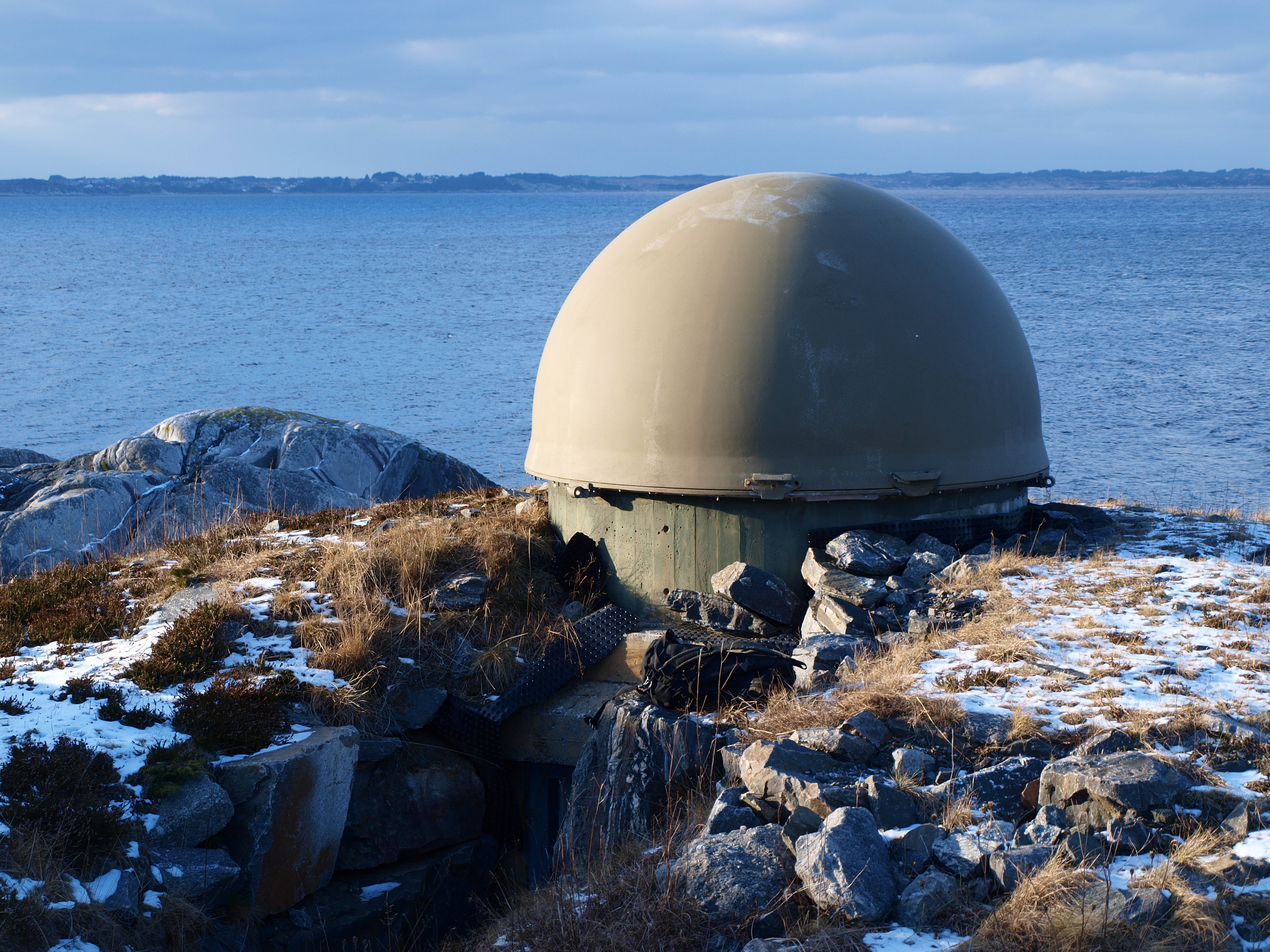 Varslingsradar 1045, Herdla torpedobatteri. Foto: Anne Midtrød. Fra Riksantikvarens Kulturminnesøk.